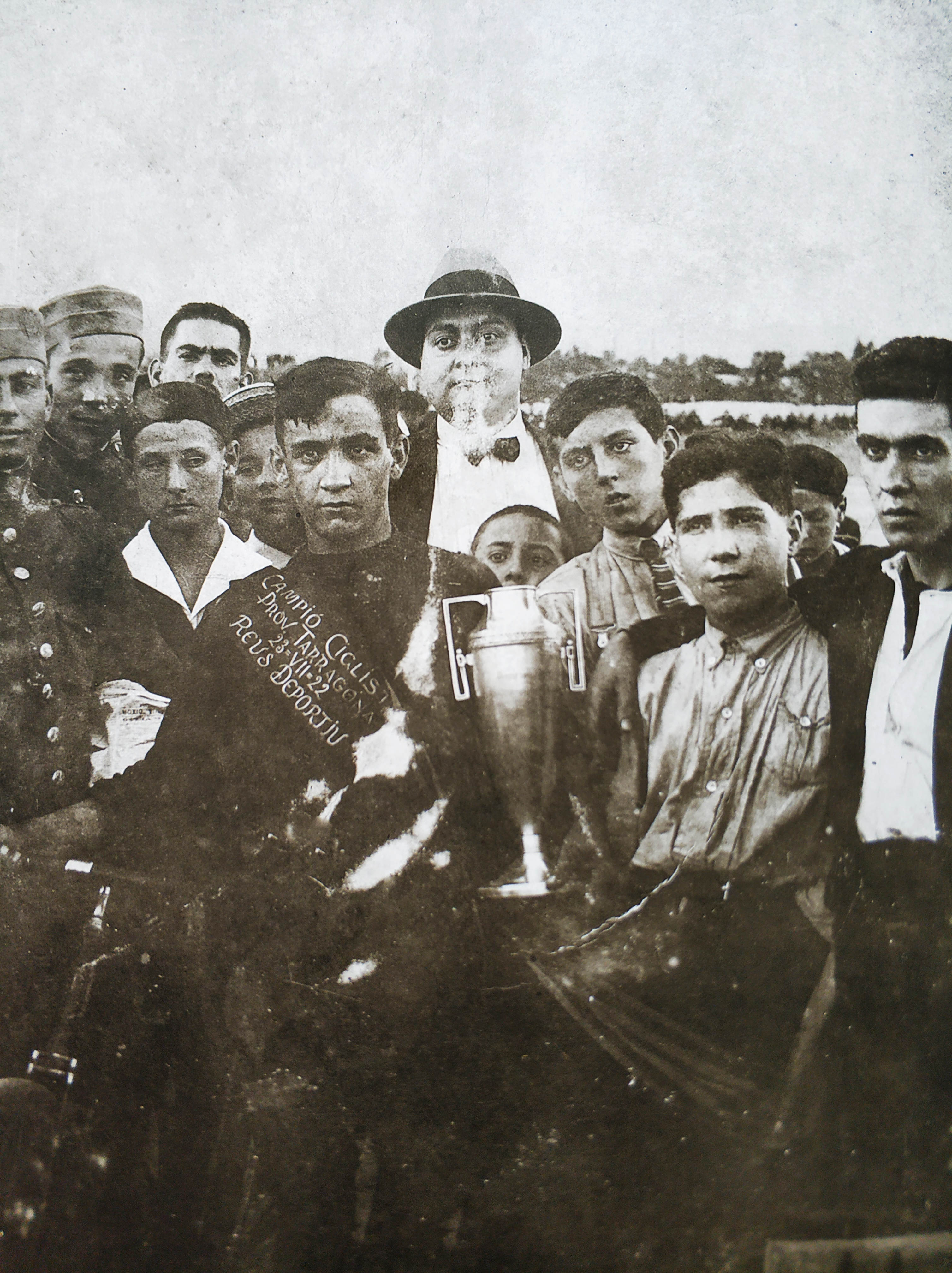 Foto del Protagonista